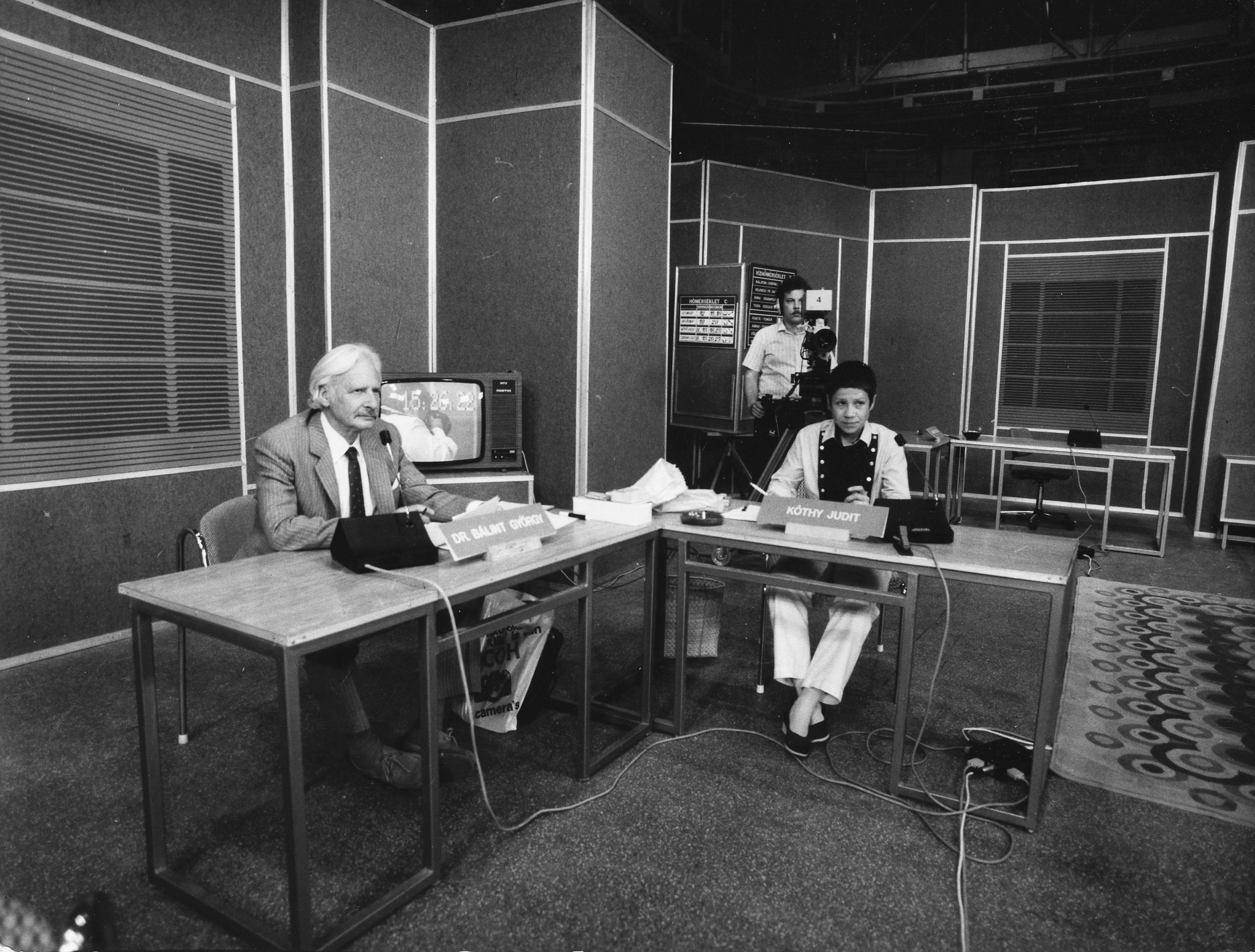 az MTV Ablak című műsorának stúdiója, Dr. Bálint György (Bálint gazda) és Kóthy Judit szerkesztő. Location: Hungary, Budapest V. Tags: Hungarian TV, Budapest Title: az MTV Ablak című műsorának stúdiója, Dr. Bálint György (Bálint gazda) és Kóthy Judit szerkesztő.